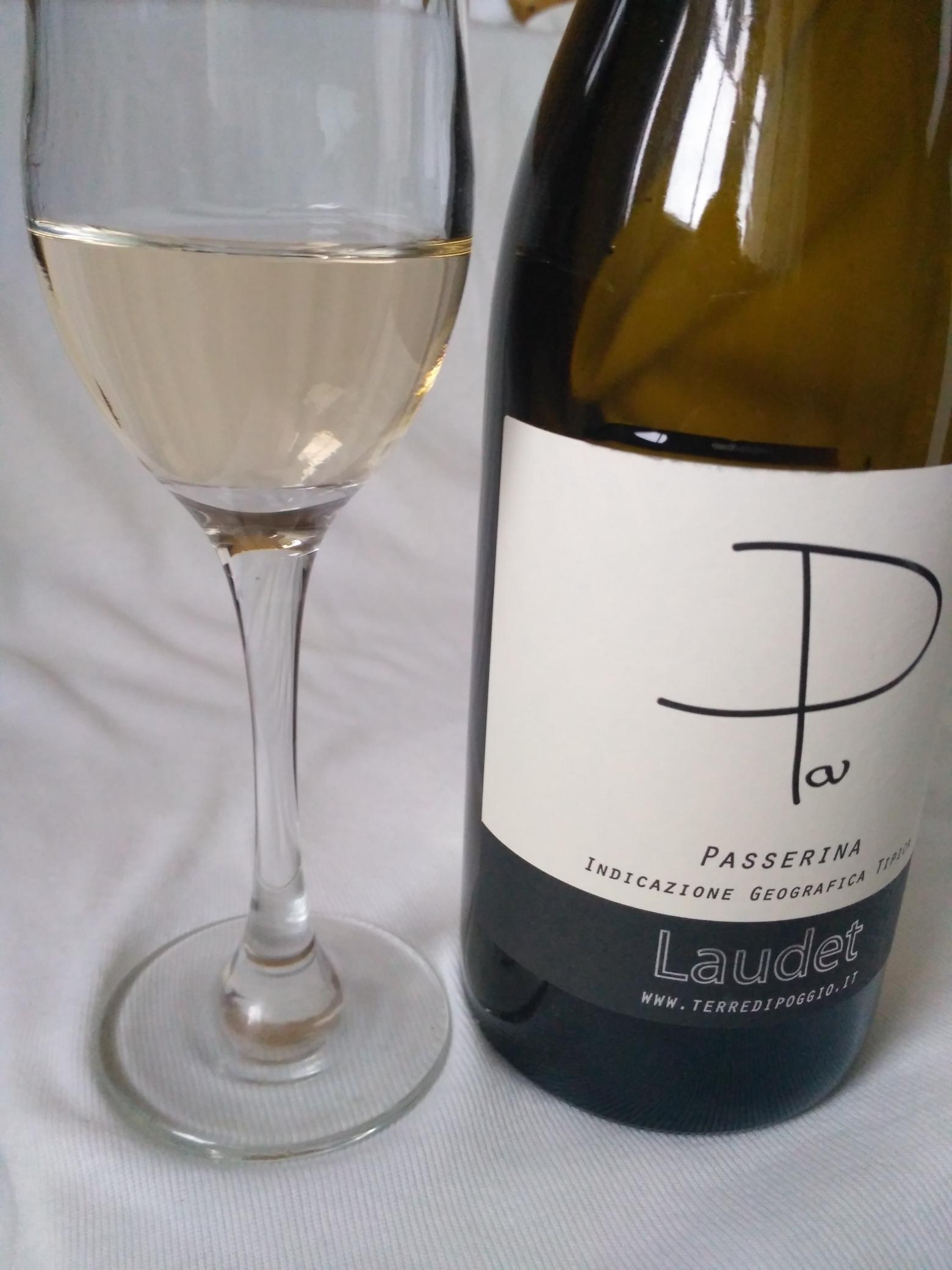 Келих вина з винограду Пассеріна